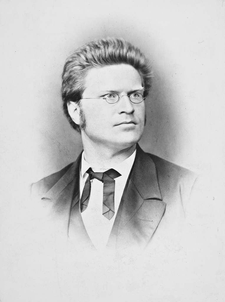 Tittel / Title: Bjørnstjerne Bjørnson, 1860. Dato / Date: 1860 Fotograf / Photographer: Budtz Müller & Co. (København) Eier / Owner Institution: Nasjonalbiblioteket / National Library of Norway Lenke / Link: Bildesignatur / Image Number: no-nb_blds_01191